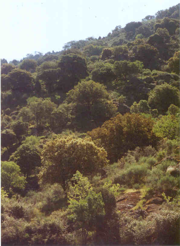 Vista de encinar en el río Duero.